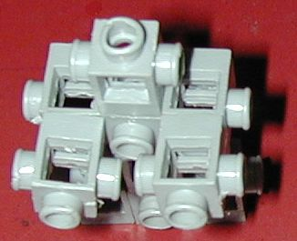 Mehrere Rasti Knotenbausteine in unterschiedlicher Kombination miteinander verbunden.